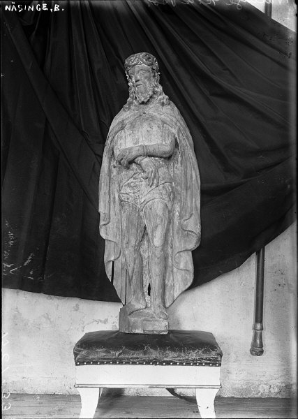 Träskulptur. Kristus som smärtornas man. Från 1500-talet. Snabbinventering. Kategori: (05) SkulpturerTräskulptur. Kristus som smärtornas man. Från 1500-talet. Snabbinventering.